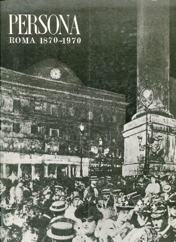 Persona, mensile di letteratura arte e costume, diretto da Adriano Grande e Marcello Camilucci. Fascicolo dedicato a «Roma 1870 -1970», Società Edizioni Nuove, Roma, 1970